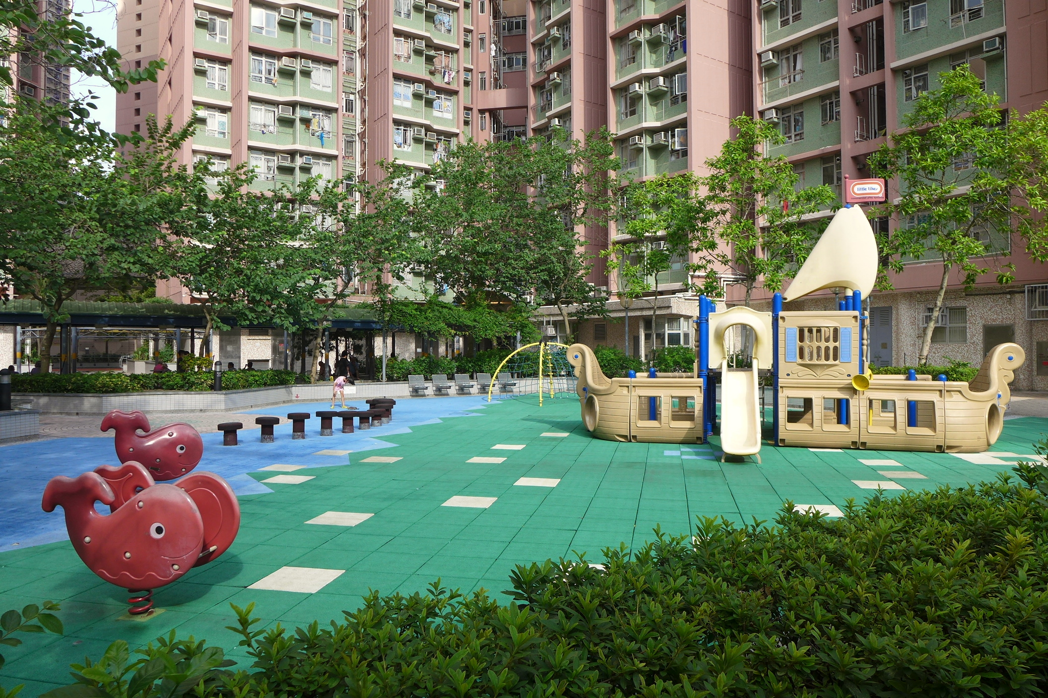 Sau Mau Ping Estate Children Playground